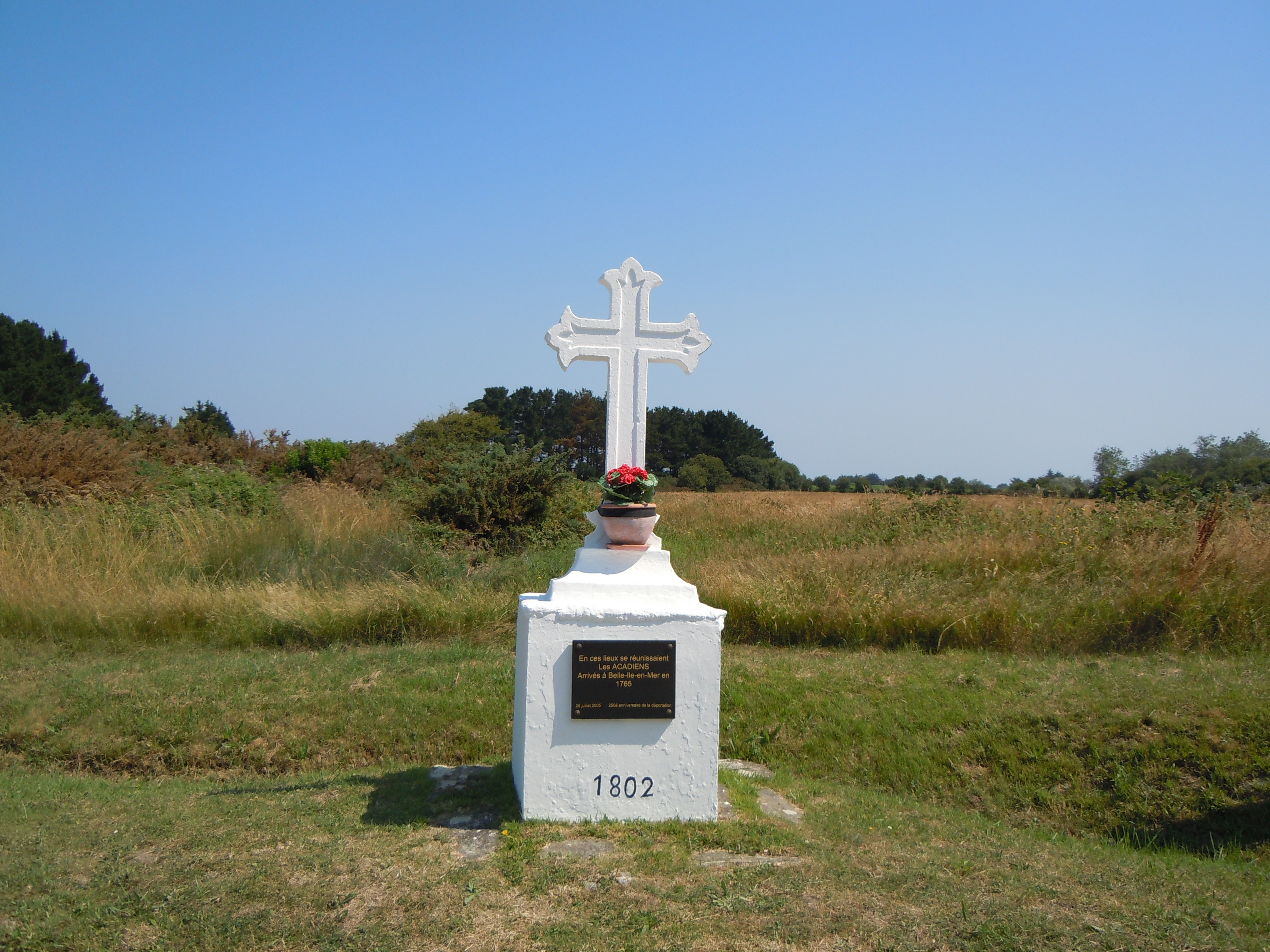 Croix de Bortémon, Bangor, Morbihan